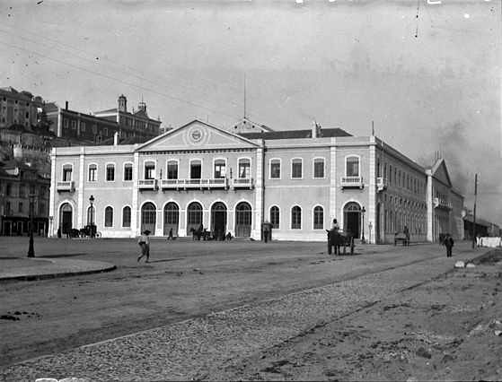 Estação de Santa Apolónia, ainda só com dois pisos.